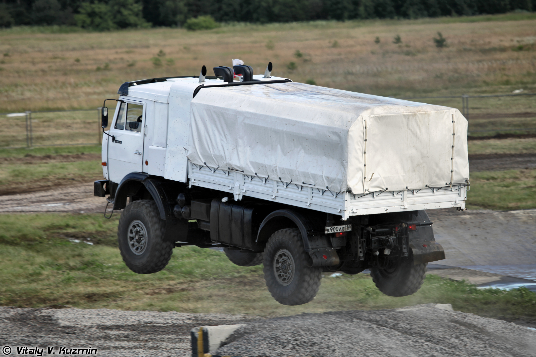 КАМАЗ-4911 Extreme (KAMAZ-4911 Extreme)